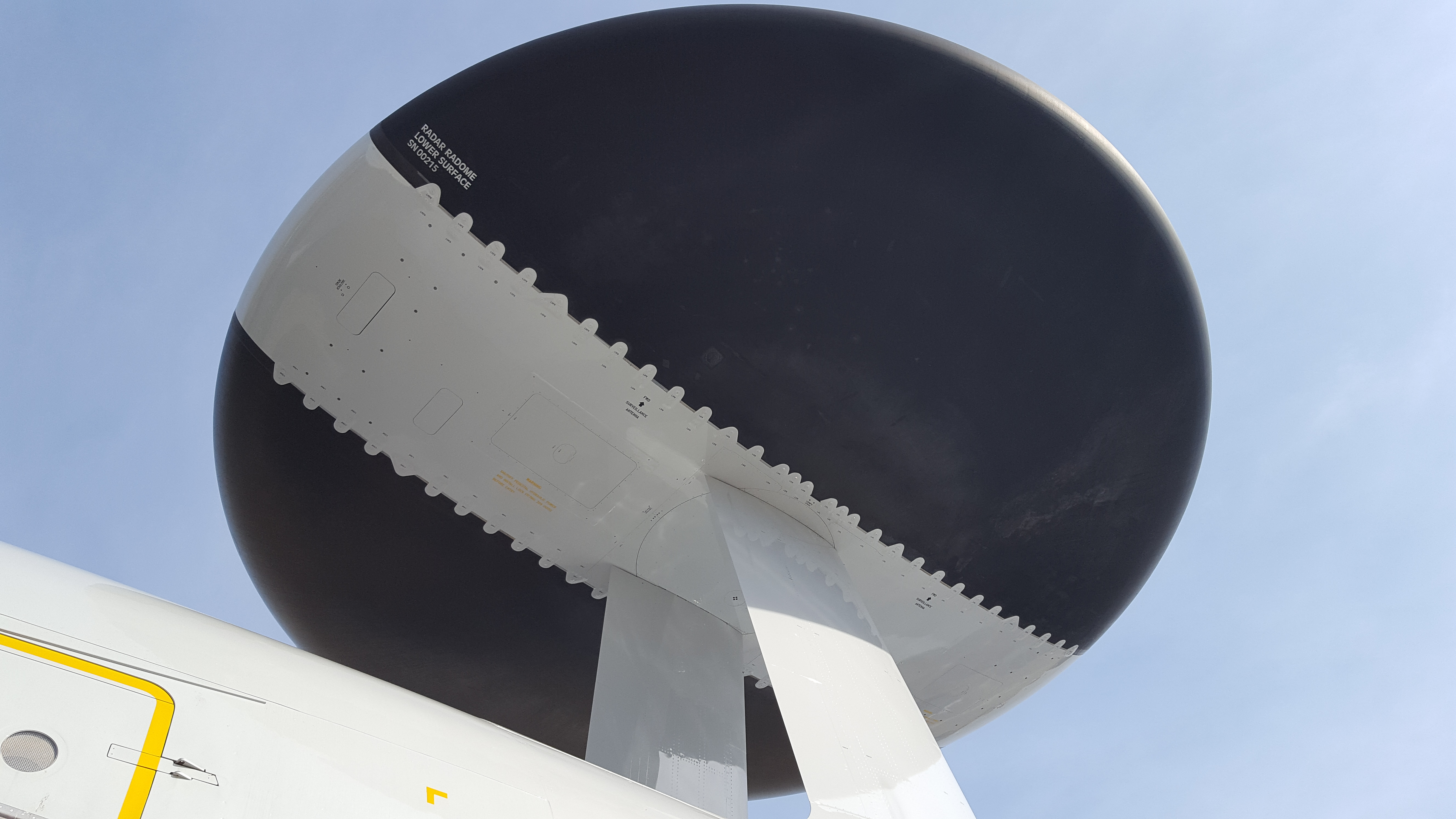 AWACS Boeing E-3 in Geilenkirchen